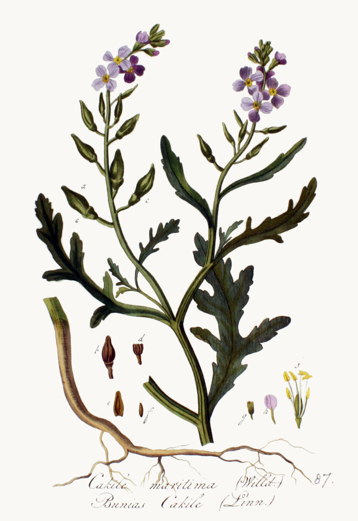 Cakile maritima Scop. (Syn. Bunias cakile L.)